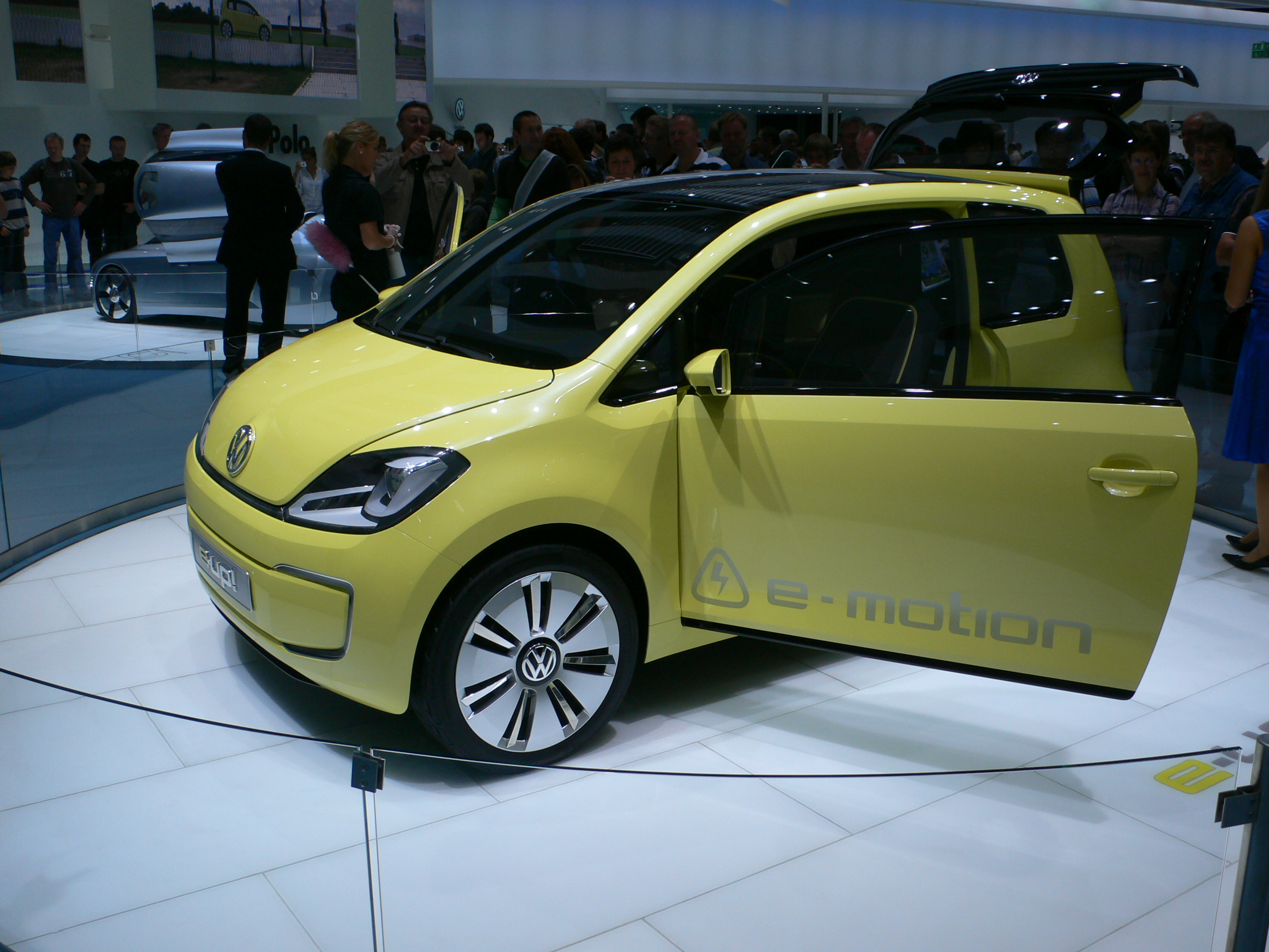 Volkswagen E-Up! au Salon de Francfort 2009